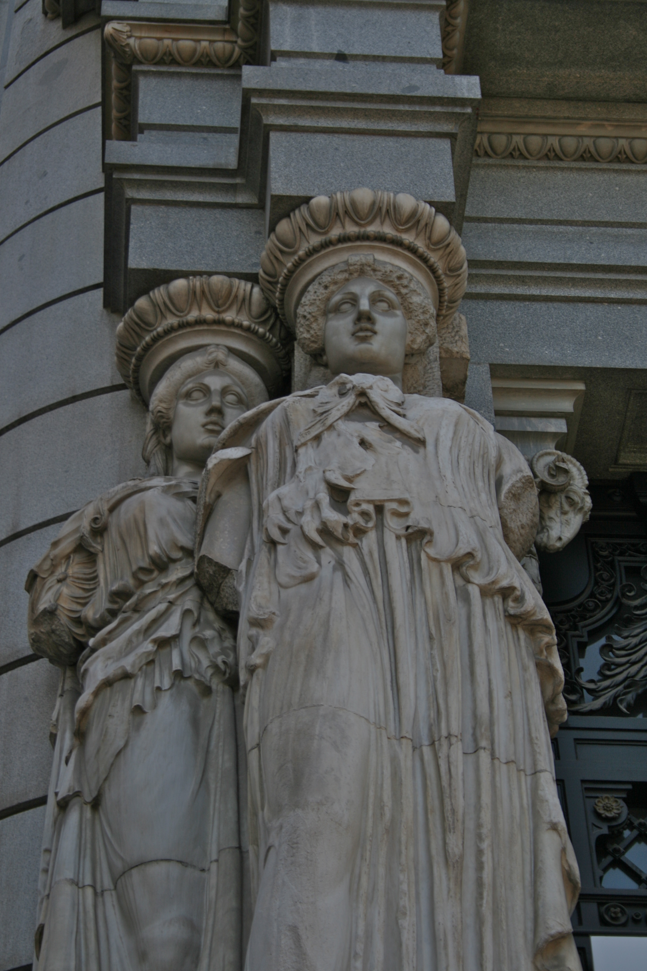 Cariátiades - Calle de Alcalá